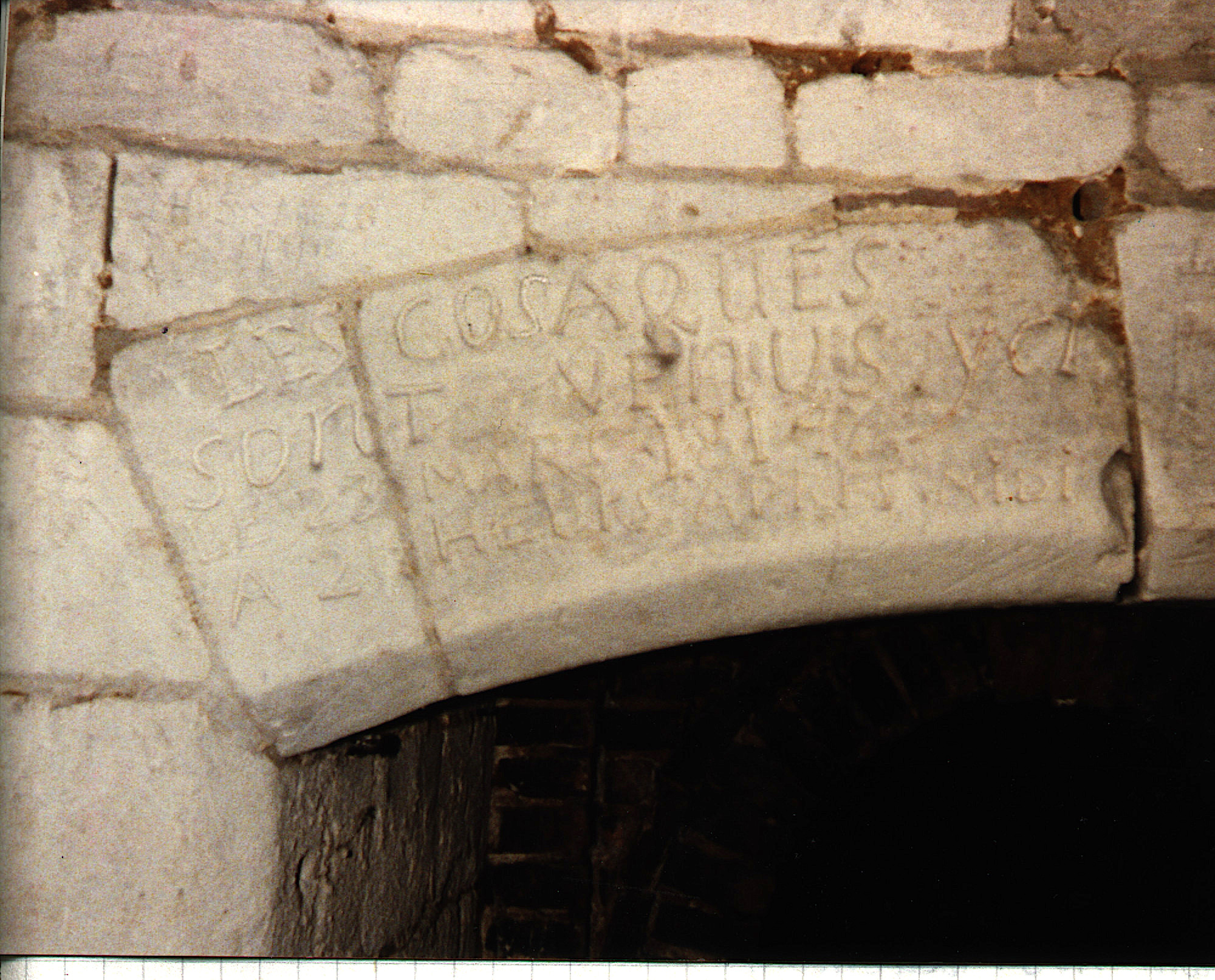 Linteau découvert à Coullemelle gravé lors du passages des cosaques en 1814